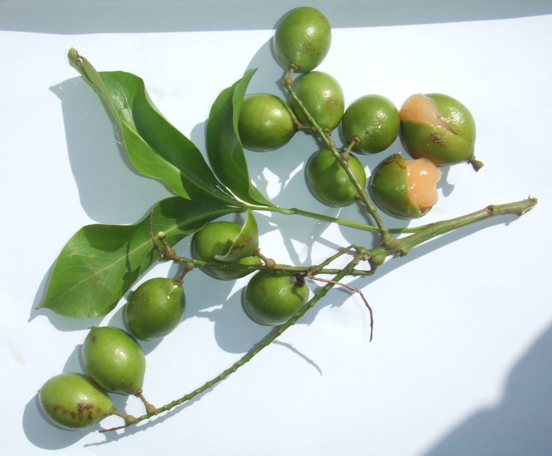 Melicoccus bijugatus bought at the Visserijplein market in Rotterdam, The Netherlands